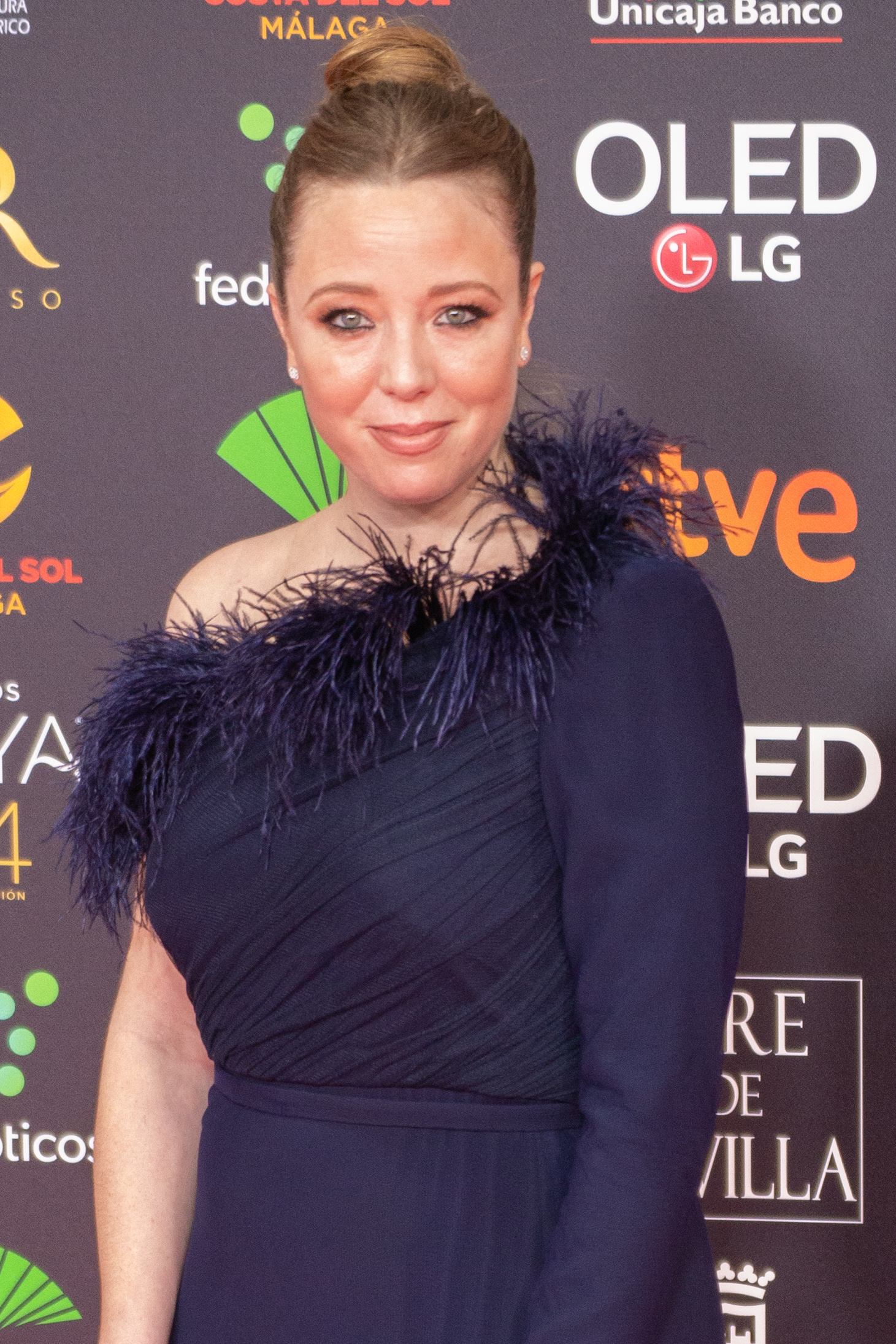 Ainhoa Santamaría en la alfombra roja de los premios Goya celebrados en Málaga en enero de 2020